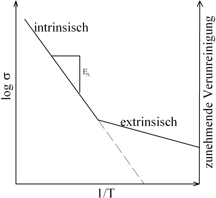 Die Art der Leitfähigkeit in Abhängigkeit von der Temperatur und der Dotierung